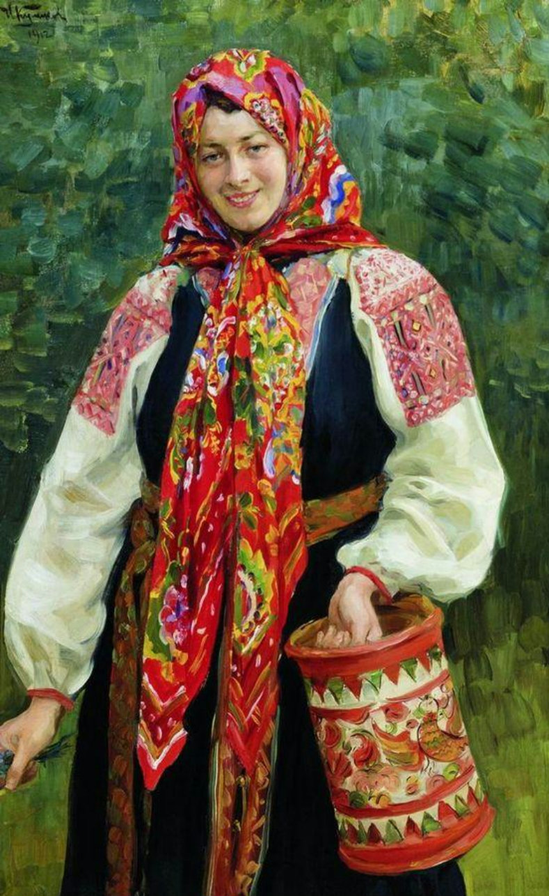 Куликов И. С. Девушка с туесом. 1912